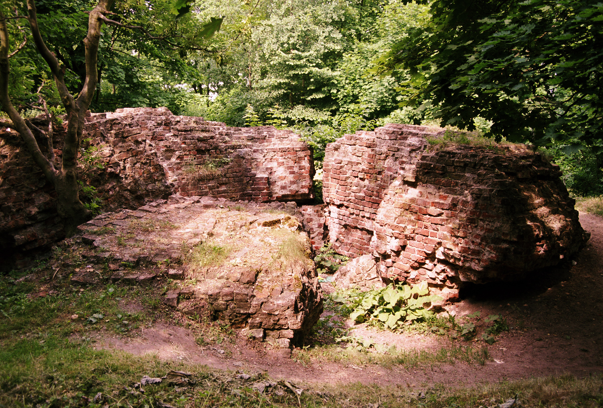 ruiny zamku, 1301-1311 Wąbrzeźno, Miasto Wąbrzeźno